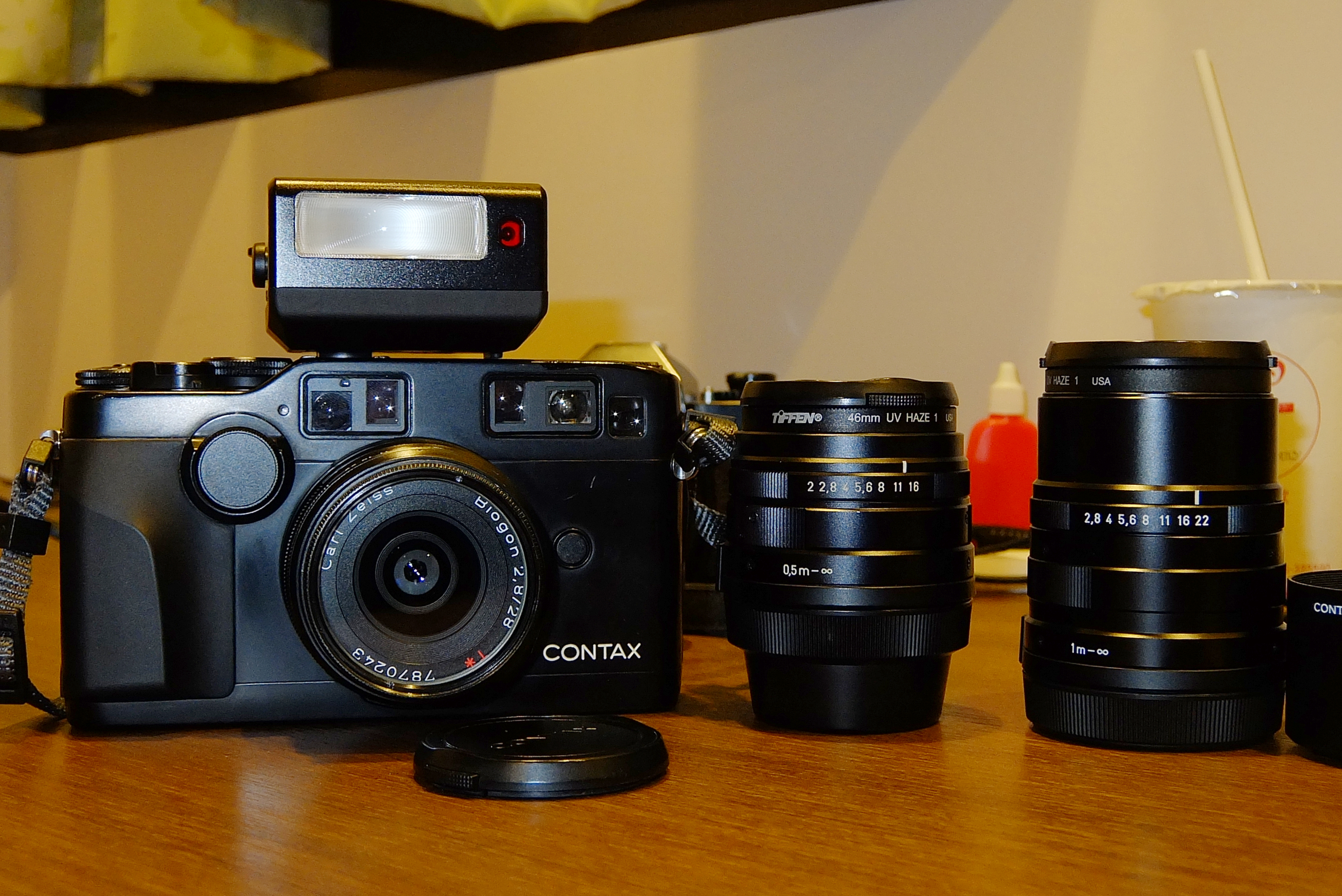 CONTAX G2 + G28 + G35 + G90 2013/01/19